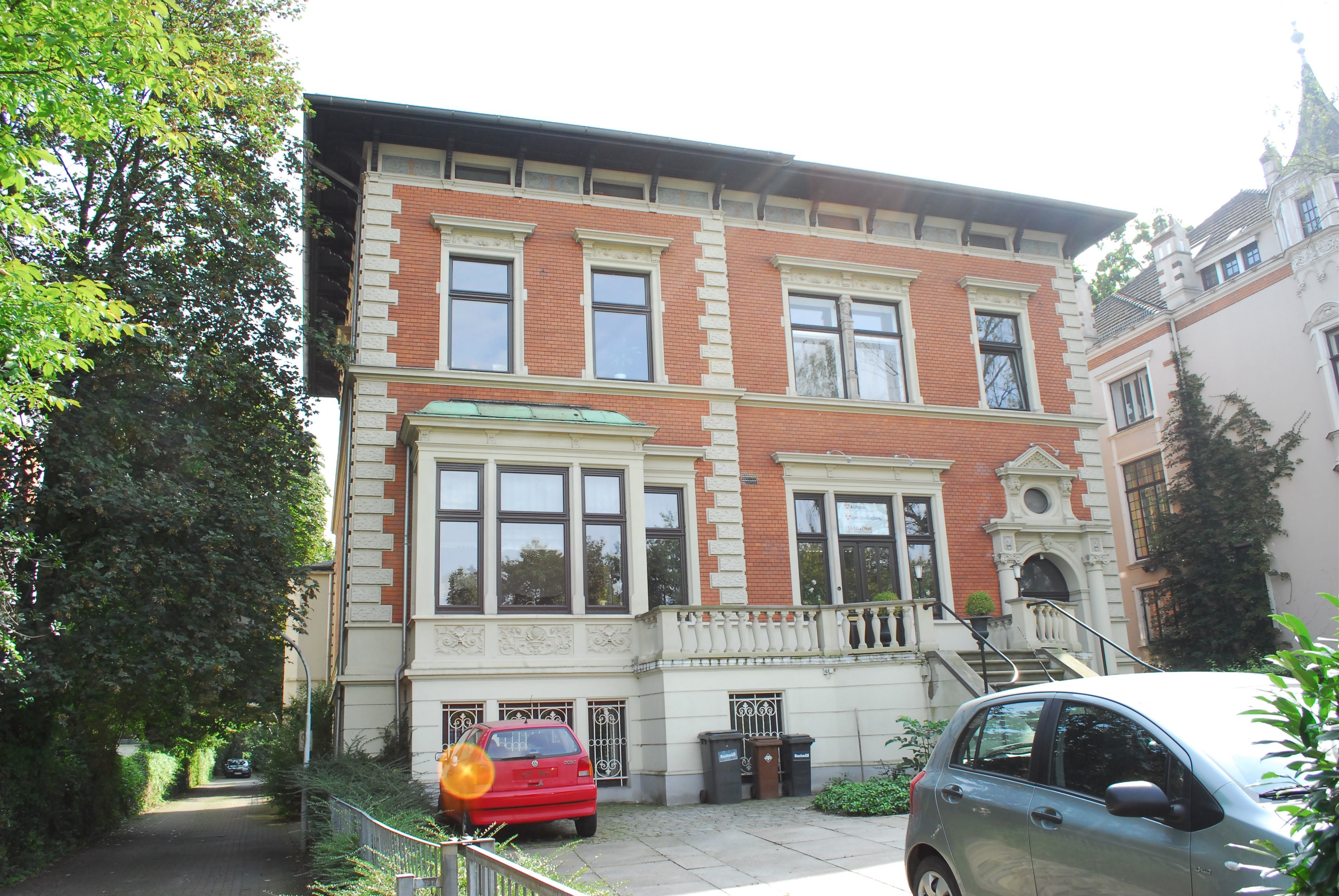 Villa Frese in Bremen, Schwachhauser Heerstraße 59.Das abgebildete Objekt ist ein geschütztes Kulturdenkmal in der Freien Hansestadt Bremen, mit der Nr. 1120 beim Landesamt für Denkmalpflege registriert.